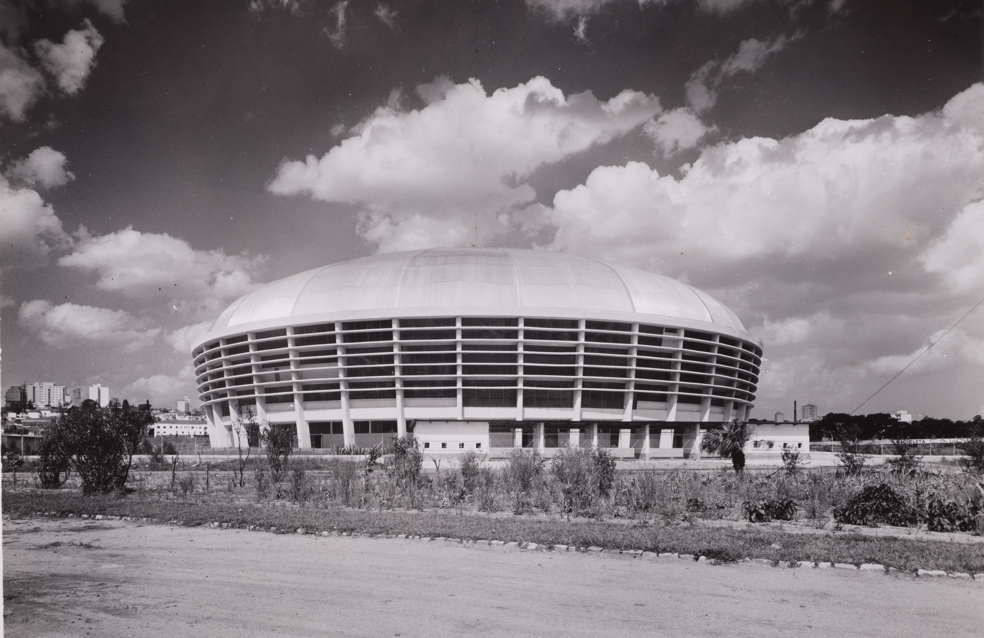 Obra que integra o acervo do Museu Paulista da USP. Coleção Werner Haberkorn - CHW